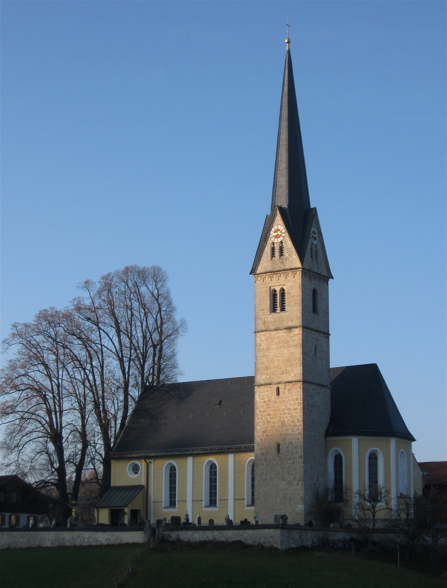 Reichersdorf, Irschenberg; Katholische Filialkirche St. Leonhard, spätgotisch, 1496. Barocker Ausbau 1760/1772. Neugotischer Turm 1846. Friedhof mit Tuffquadereinfriedung wohl 18. Jahrhundert. D-1-82-123-61